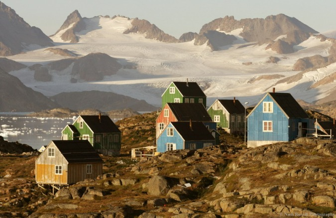 Kulusuk, Greenland